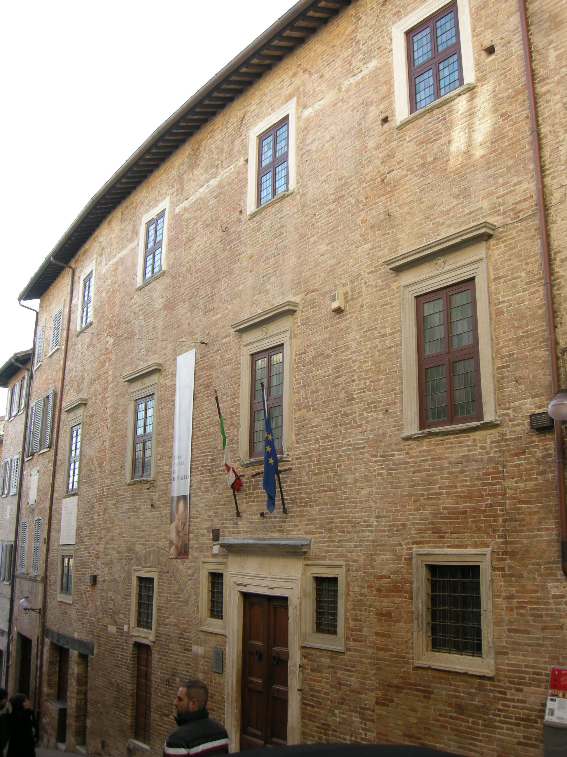 Urbino, casa di raffello